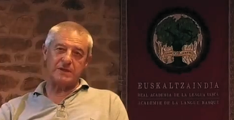 Andoni Sagarna euskaltzain oso, Industria ingeniaria, eta letretan doktorea.